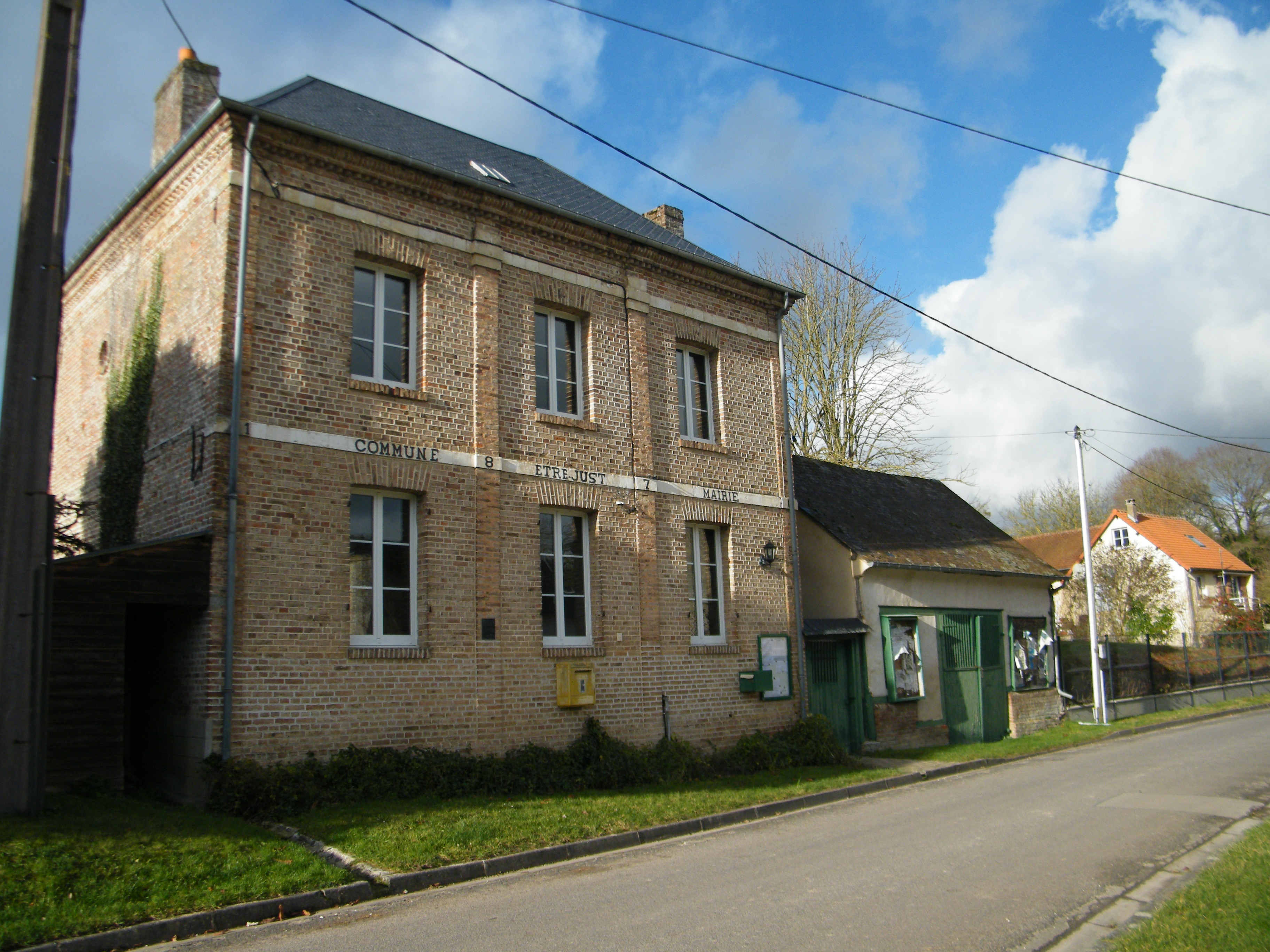 Etréjust, Somme, Fr, mairie (6)